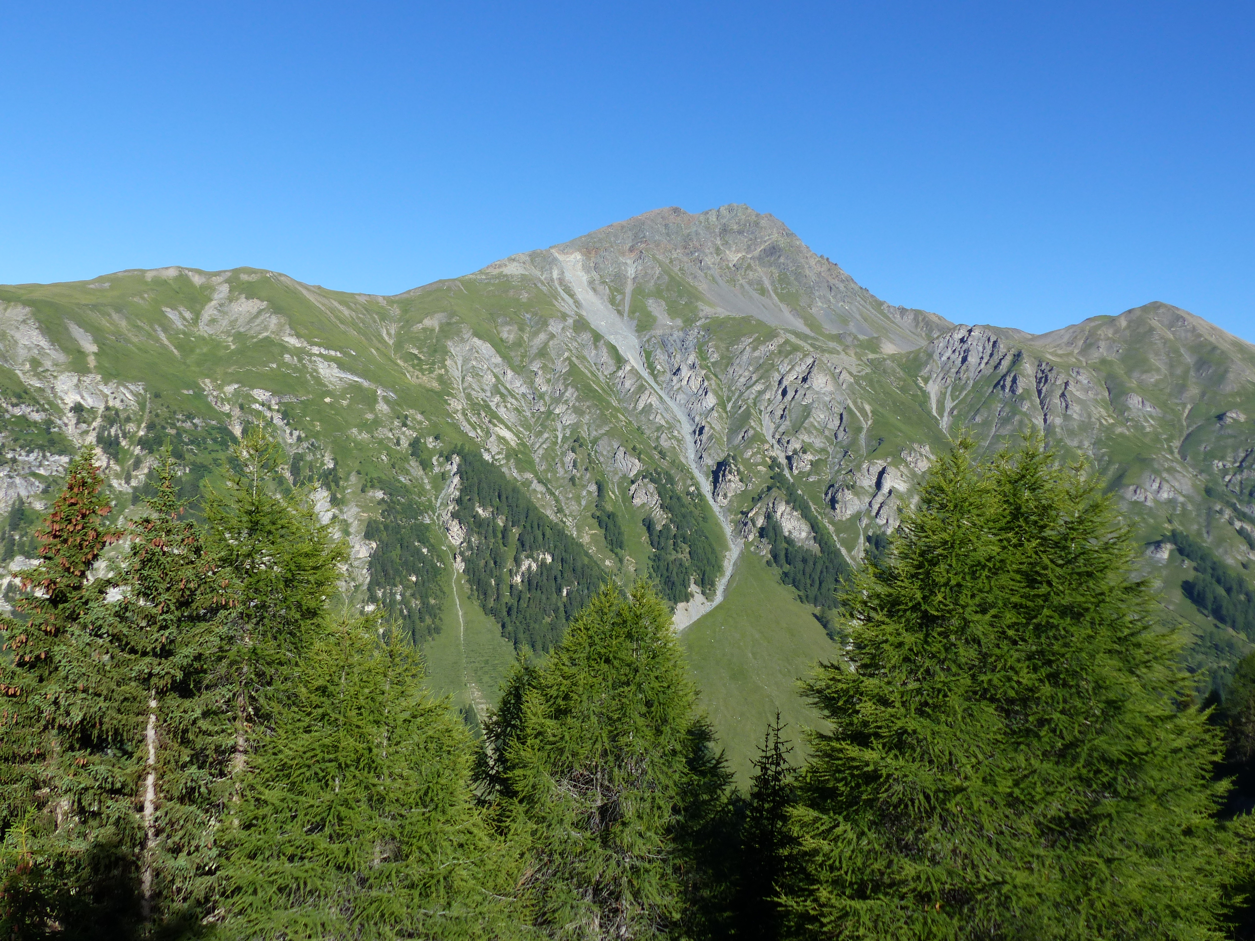 Piz Cotschen über dem unteren Val Tasna